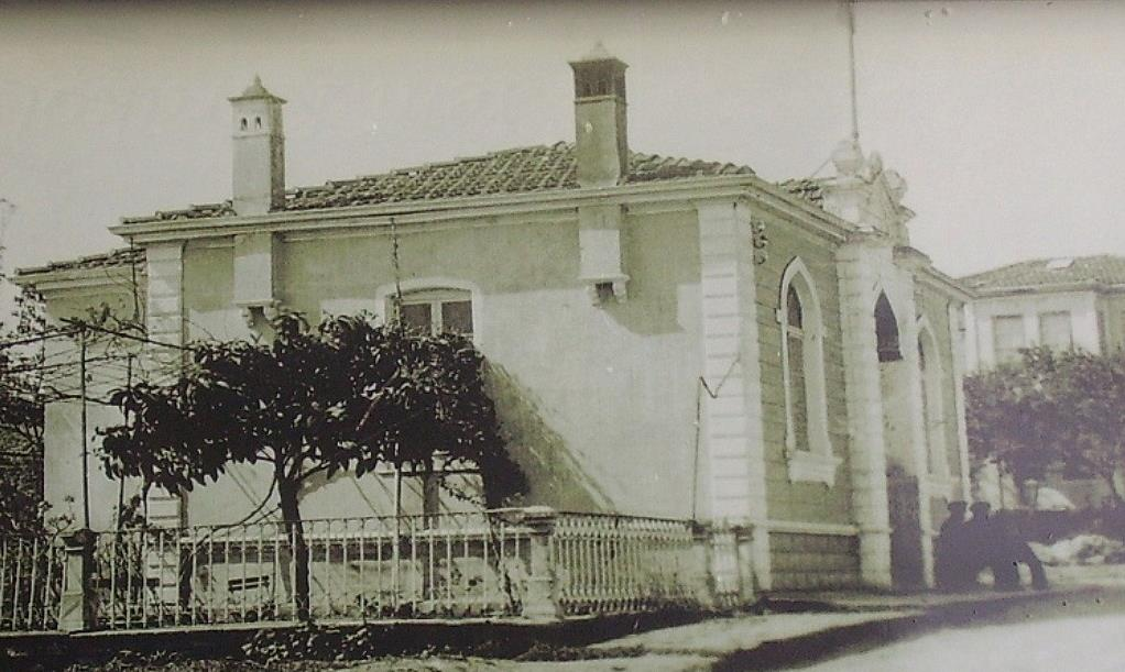 Hürriyet Mahallesi'nde bulunan yeni karakol.